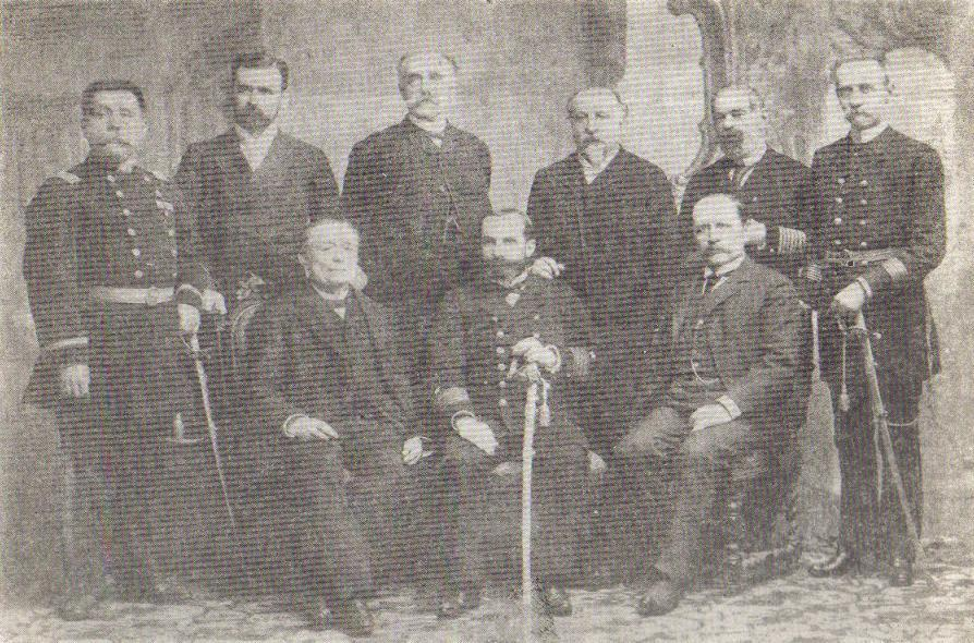 Junta de Gobierno de Iquique de 1891. Ministerio y colaboradores. de izquierda a derecha de pie General Estanislao del Canto, a cargo del ejército Constitucional; Joaquin Walker Martínez, Ministro de Relaciones Exteriores; Manuel José Irarrázaval, Ministro del Interior; Isidoro Errázuriz, Ministro de Justicia e Instrucción Pública; Gregorio Urrutia, Asesor del Ejército; General Adolfo Holley, Ministro de Guerra. Sentados de izquierda a derecha, los miembros de la junta de gobierno: Waldo Silva Palma, Vicepresidente del Senado; Capitán de Navío Jorge Montt, Presidente de la Junta; Ramón Barros Luco, Presidente de la Camara de Diputados.